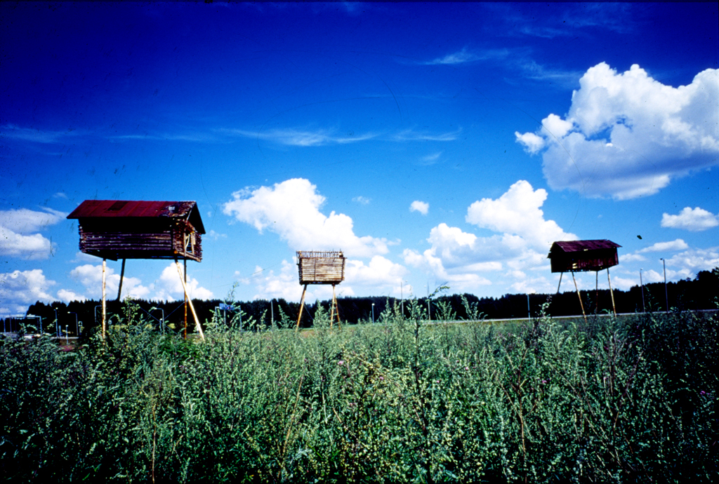 Arkkitehtoninen installaatio Maaltapako, Savonlinna, 1999 Arkkitehtoninen installaatio Maaltapako, Savonlinna, 1999